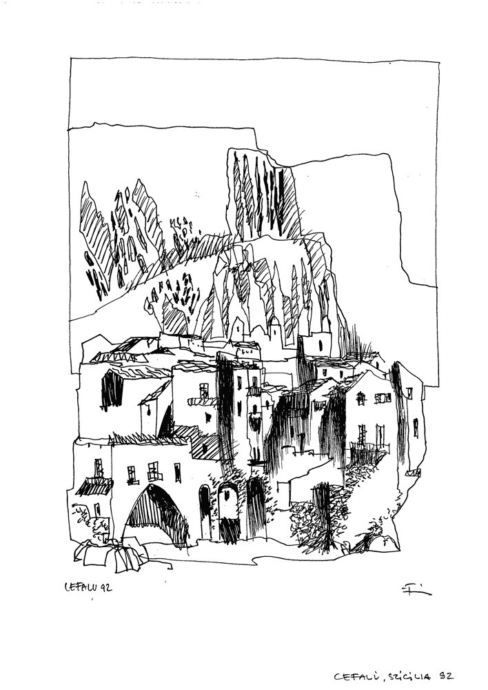 Cefalú, Szicília, Olaszország (útirajz)